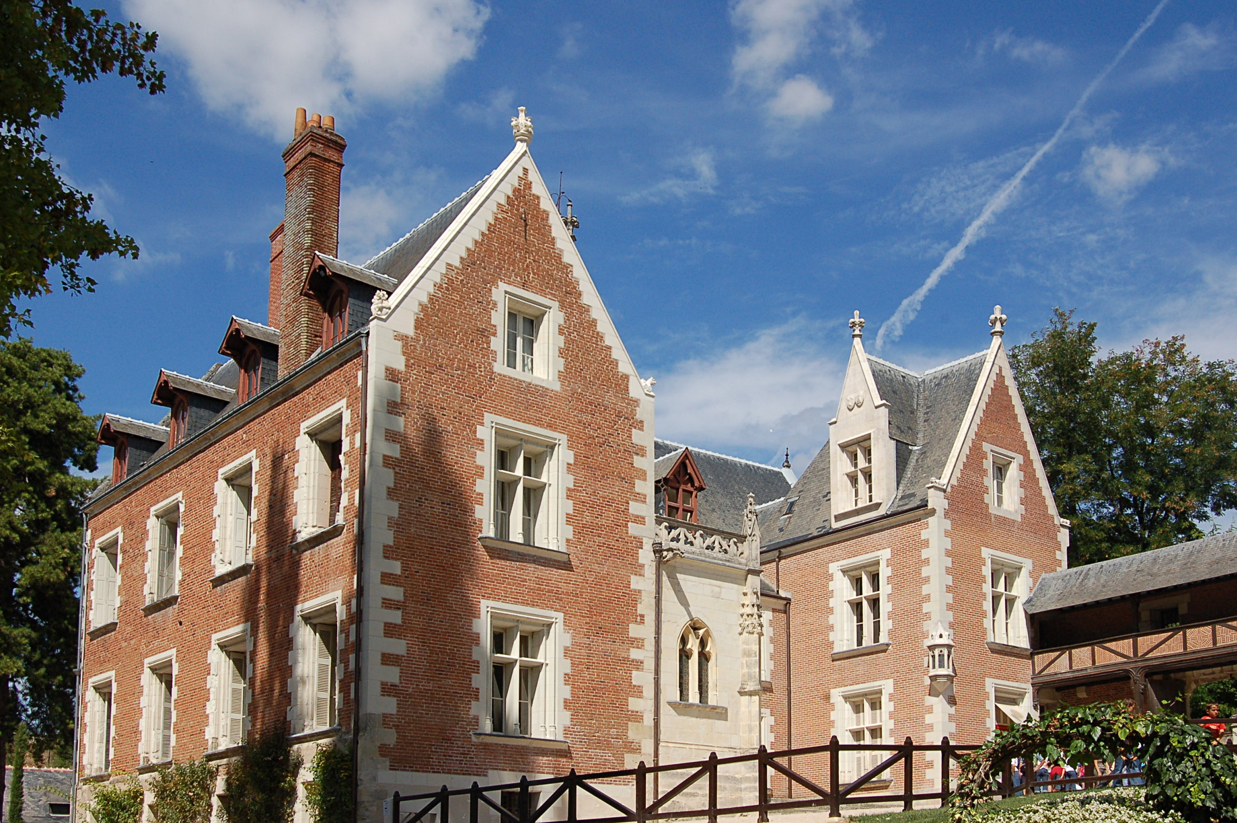 Schloss Clos Lucé in Amboise